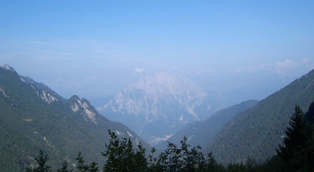 Val Paghera (Ceto), Val Camonica, Italia